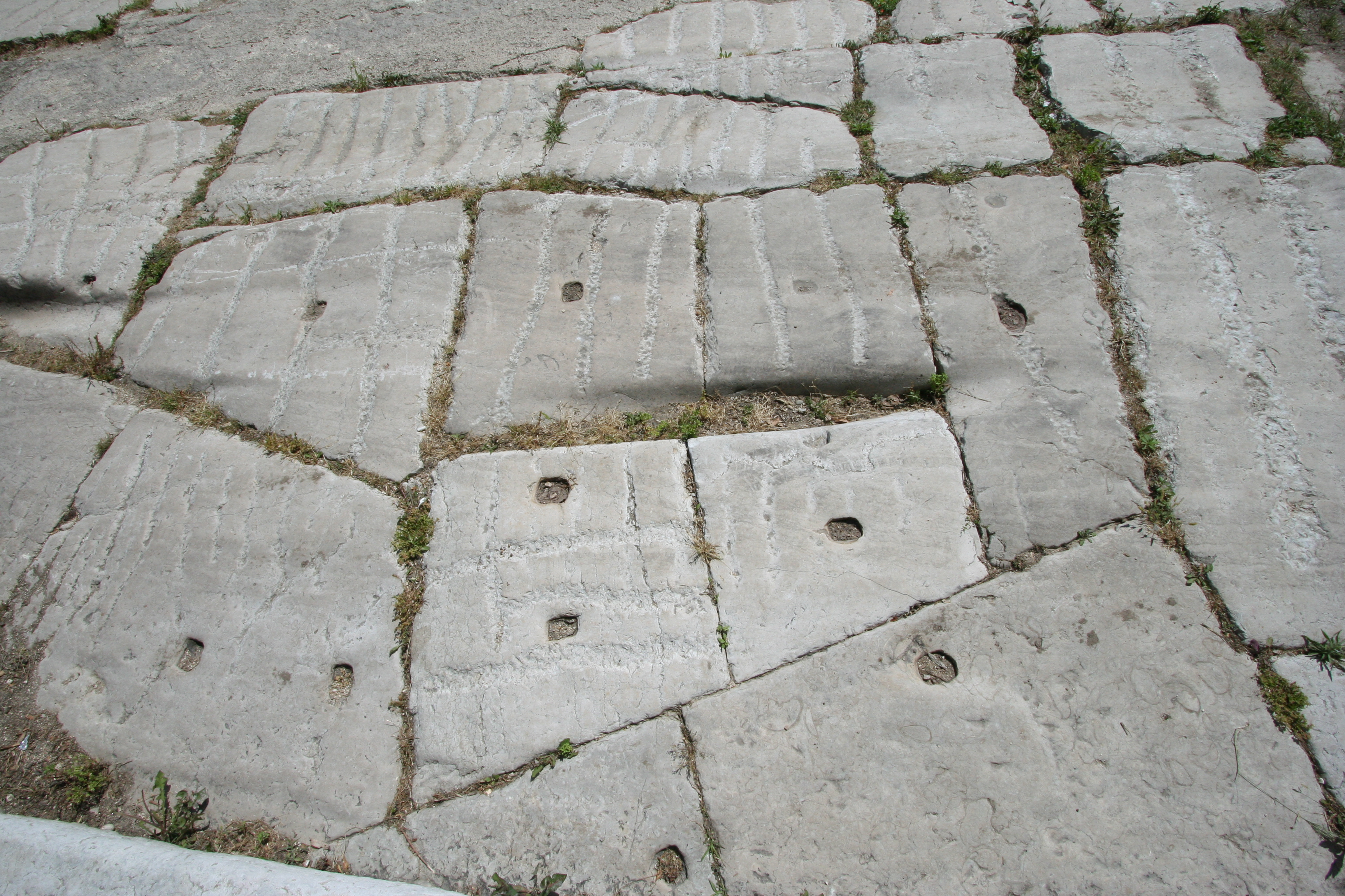 Voie dallée du jardin des vestiges à Marseille, bas empire, IV siècle.